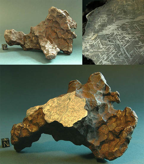 1.47kg Taza (NWA 859) iron meteorite